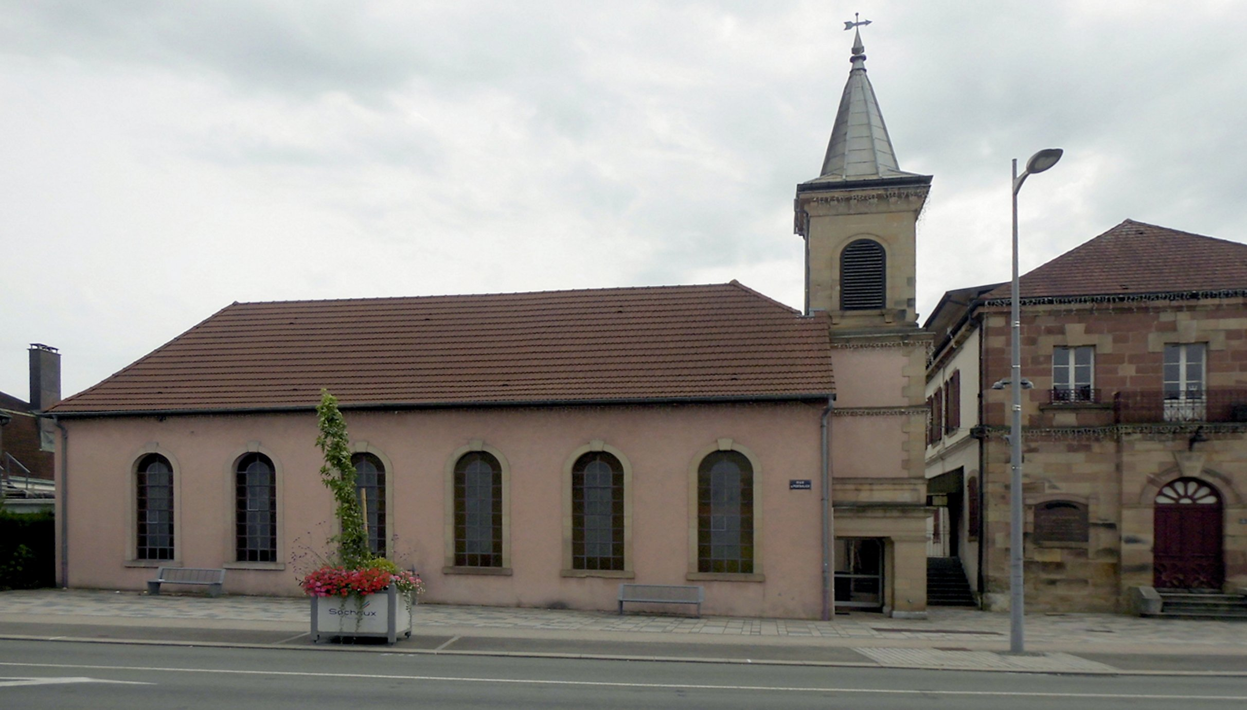 L'église luthérienne de Sochaux